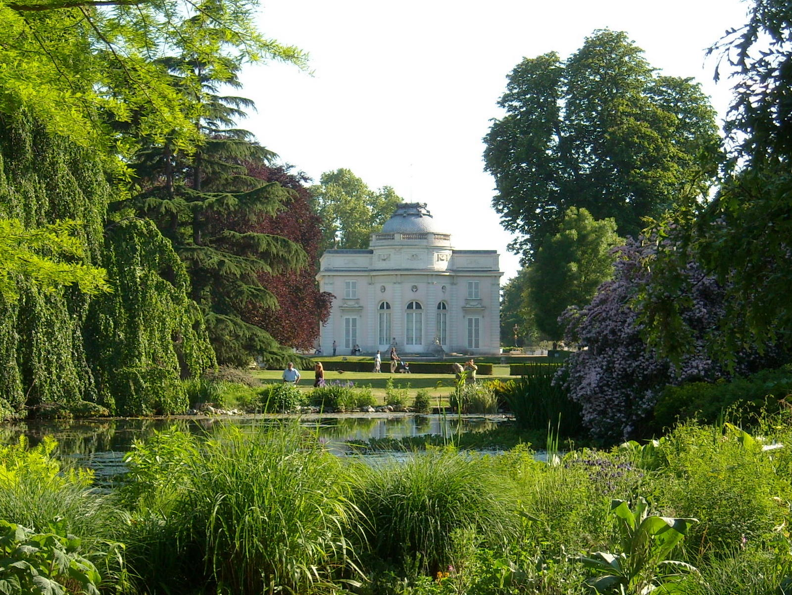 Jardin de Bagatelle au printemps